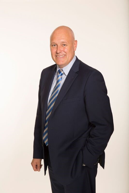 Anton Gäumann, Geschäftsleiter (CEO) der Migros Aare